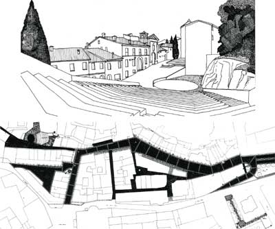 Concours pour un théâtre de plein air, Teprin Associés,1984.